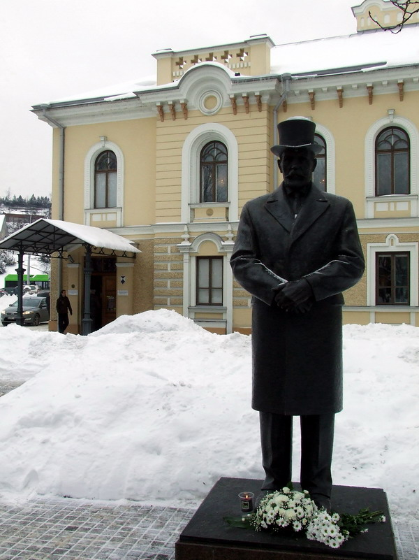 Paminklas Prezidentui Antanui Smetonai Istorinės LR Prezidentūros Kaune sodelyje.